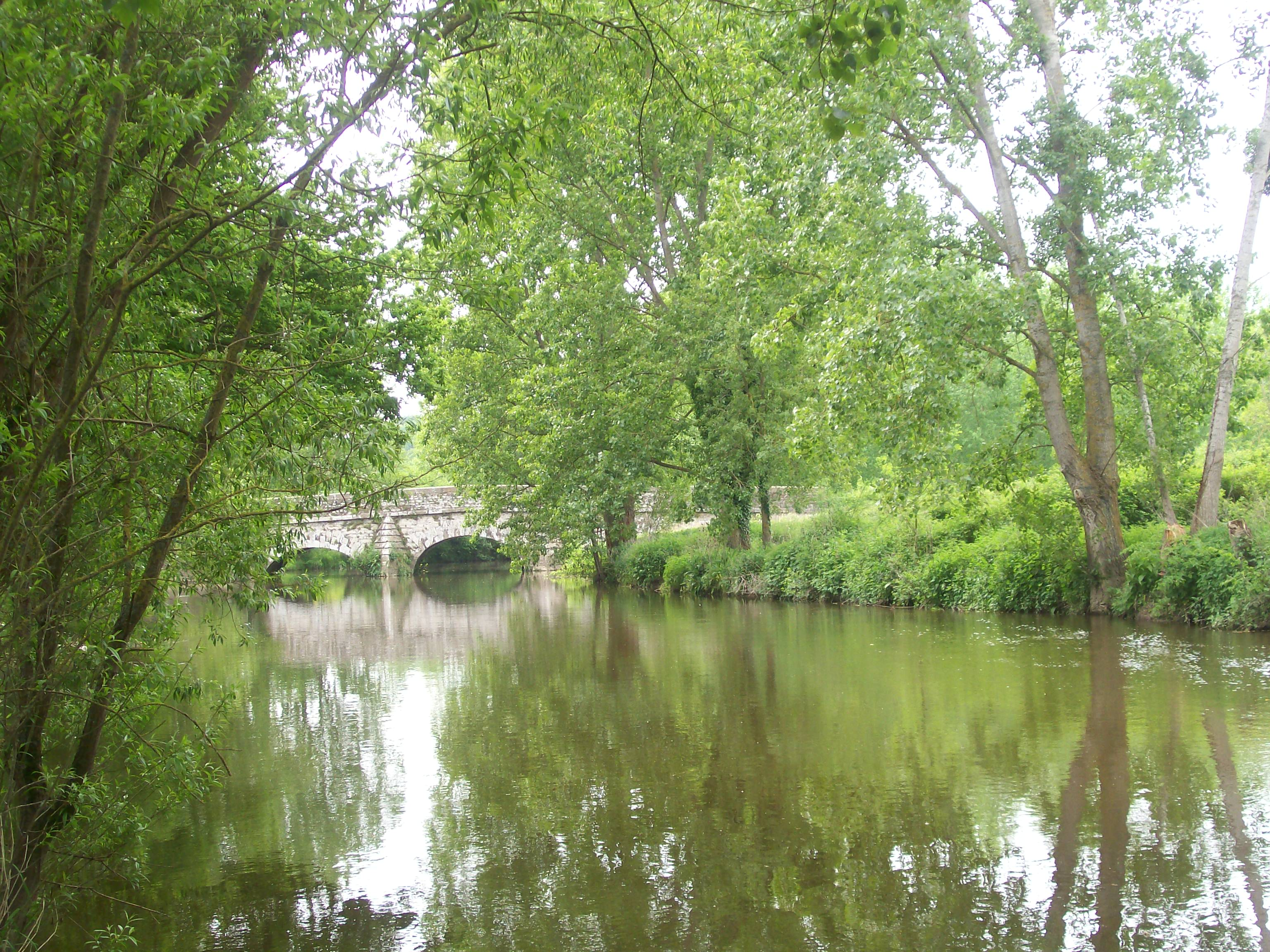 La rivière de la Seiche près du pont de Vaugon.